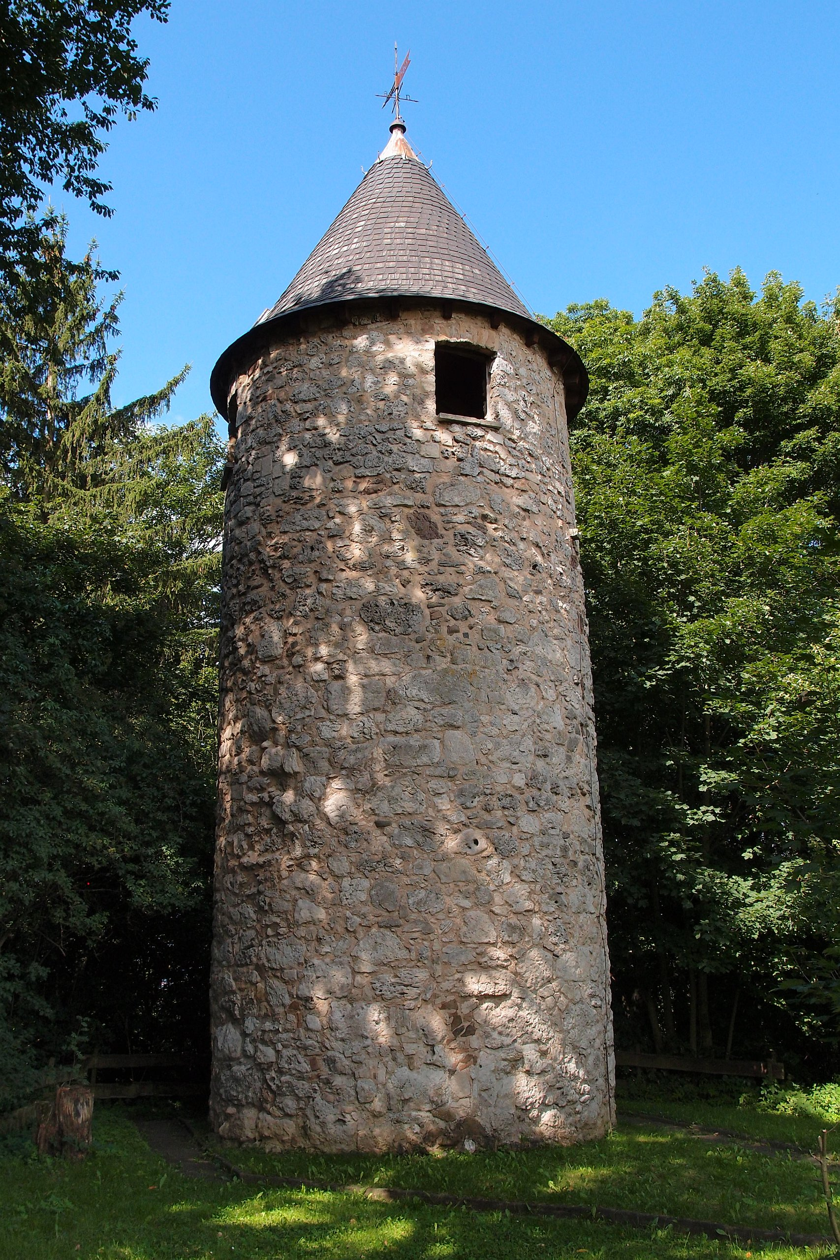 Die Alte Warte auf dem Bühberg bei Barbis, die Warte war nördlichster Teil der Hohnsteiner Landwehr an der hist. Grenze zwischen Braunschweig Grubenhagen und Grafschaft Hohenstein